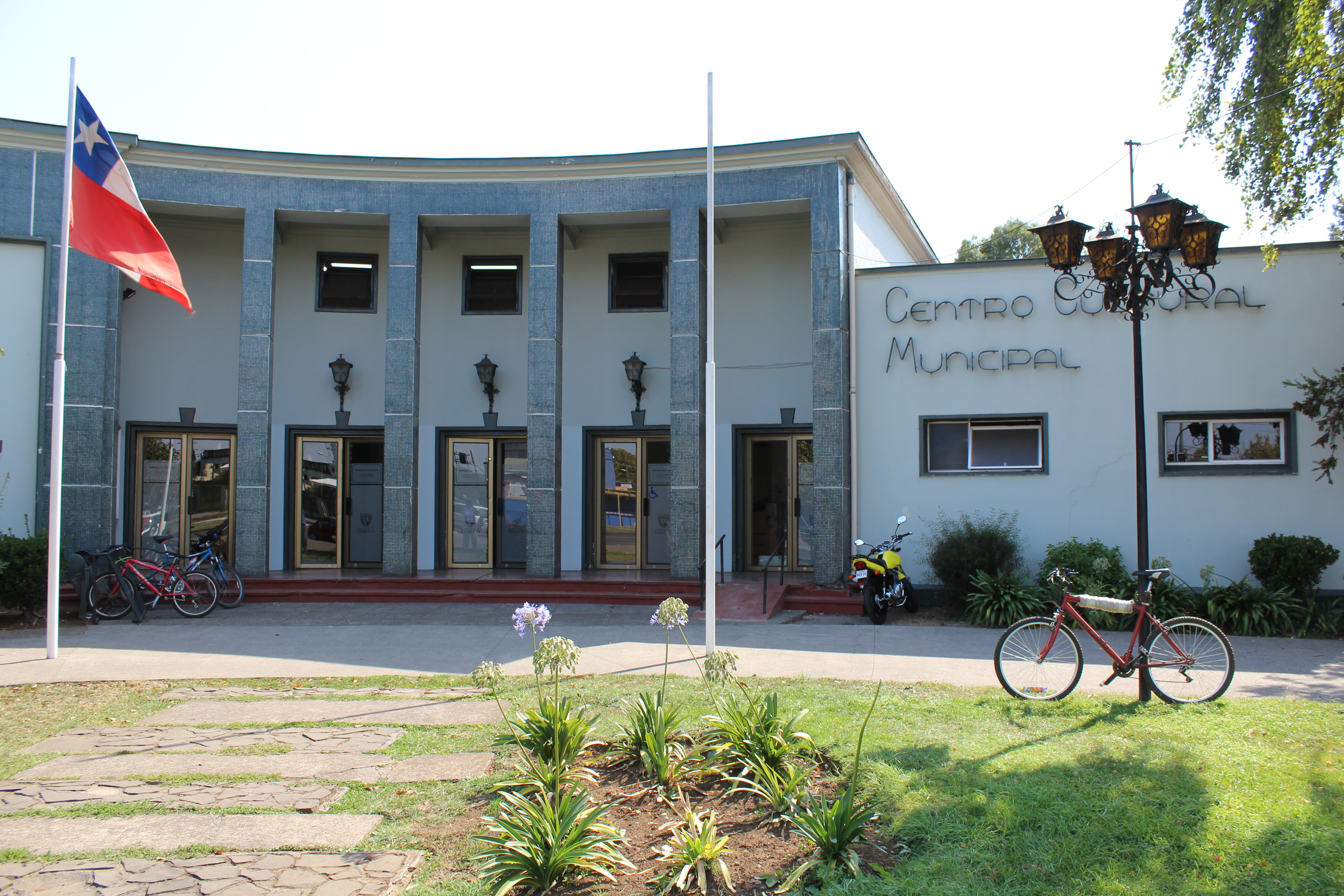 Biblioteca Galo Sepúlveda de la ciudad de Temuco, Chile.